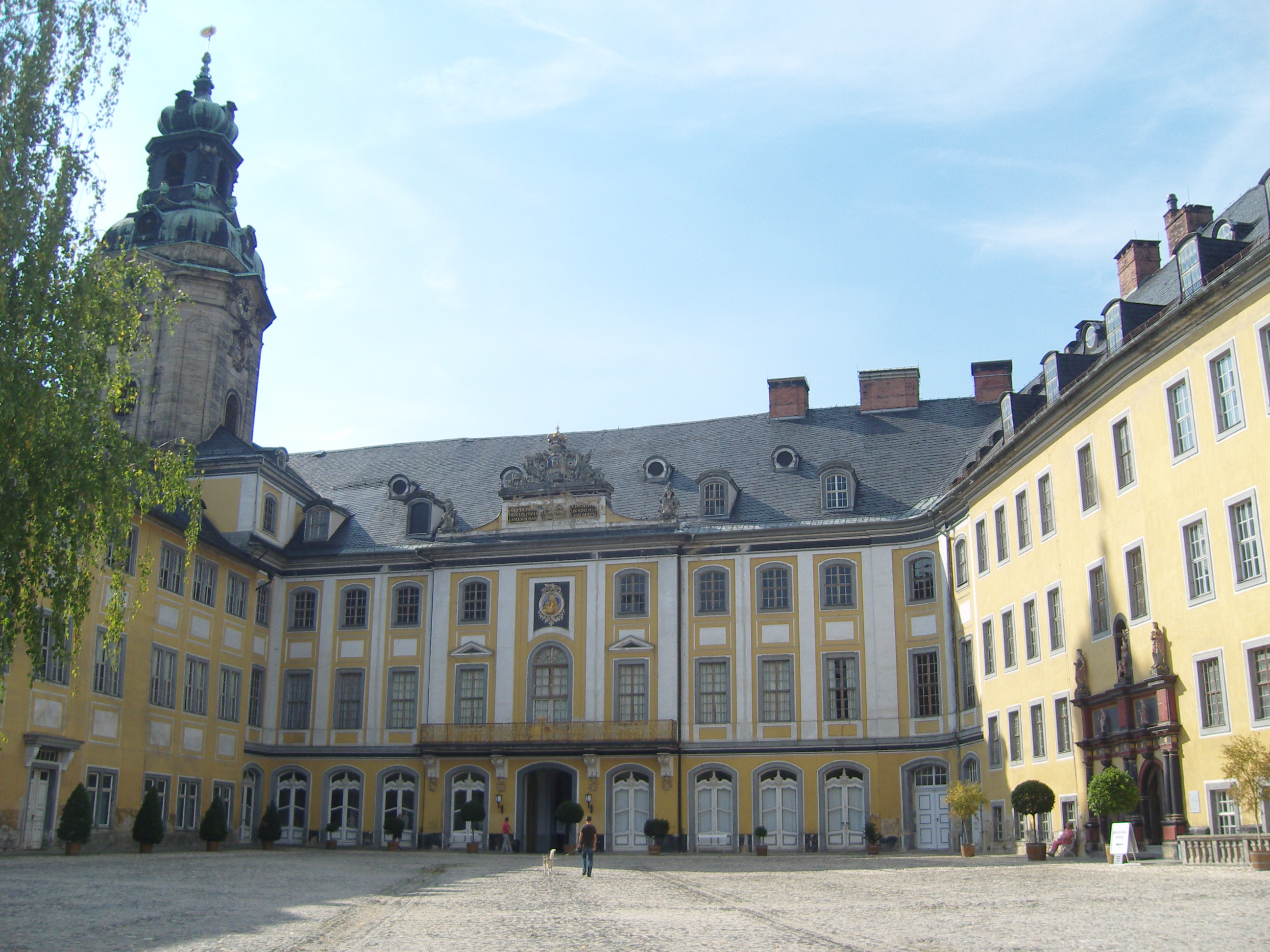 Innenhof Schloss Heidecksburg Rudolstadt